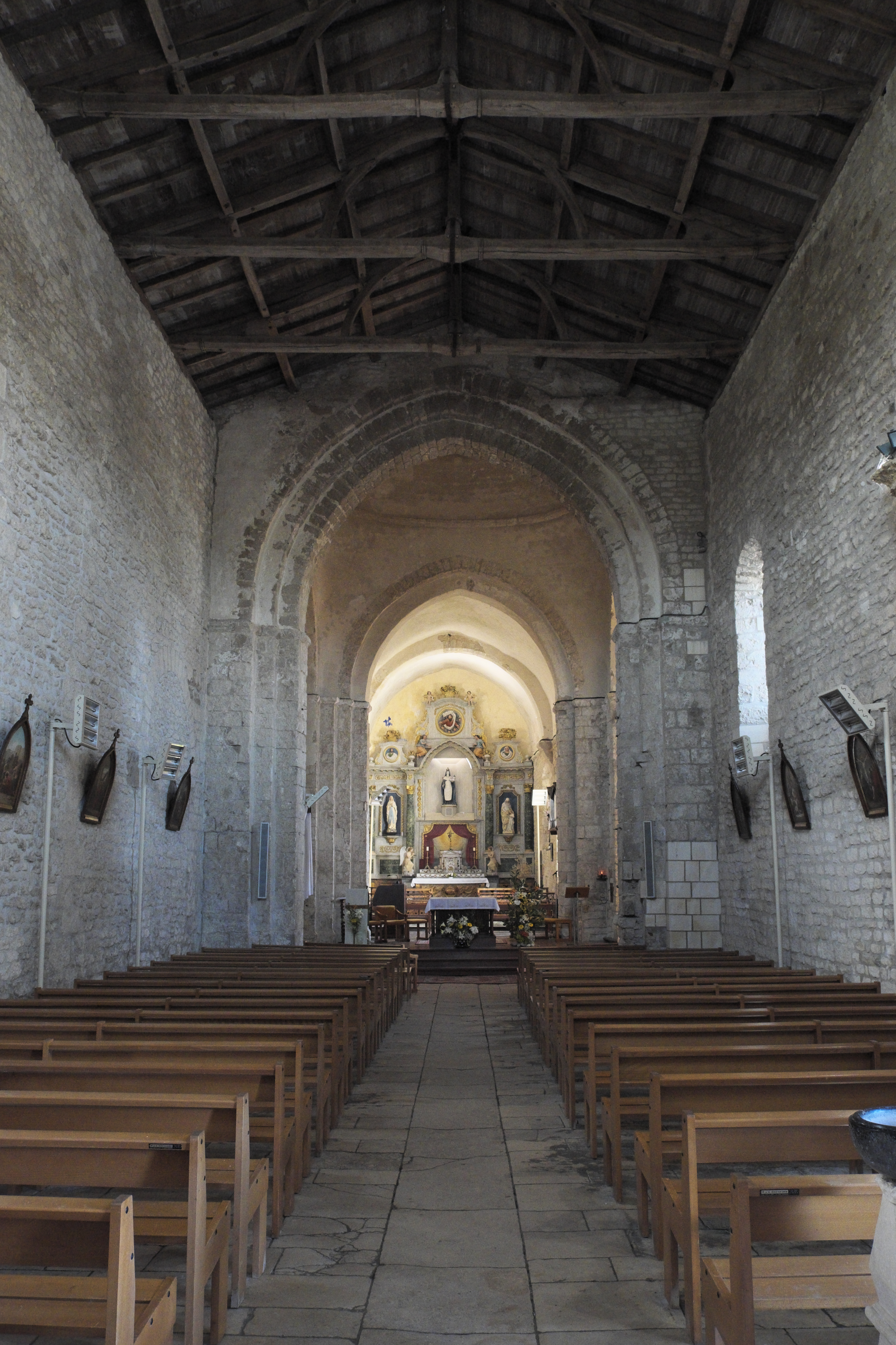 Katholische Kirche Sainte-Radegonde in Jard-sur-Mer im Département Vendée (Pays de la Loire/Frankreich), Innenraum